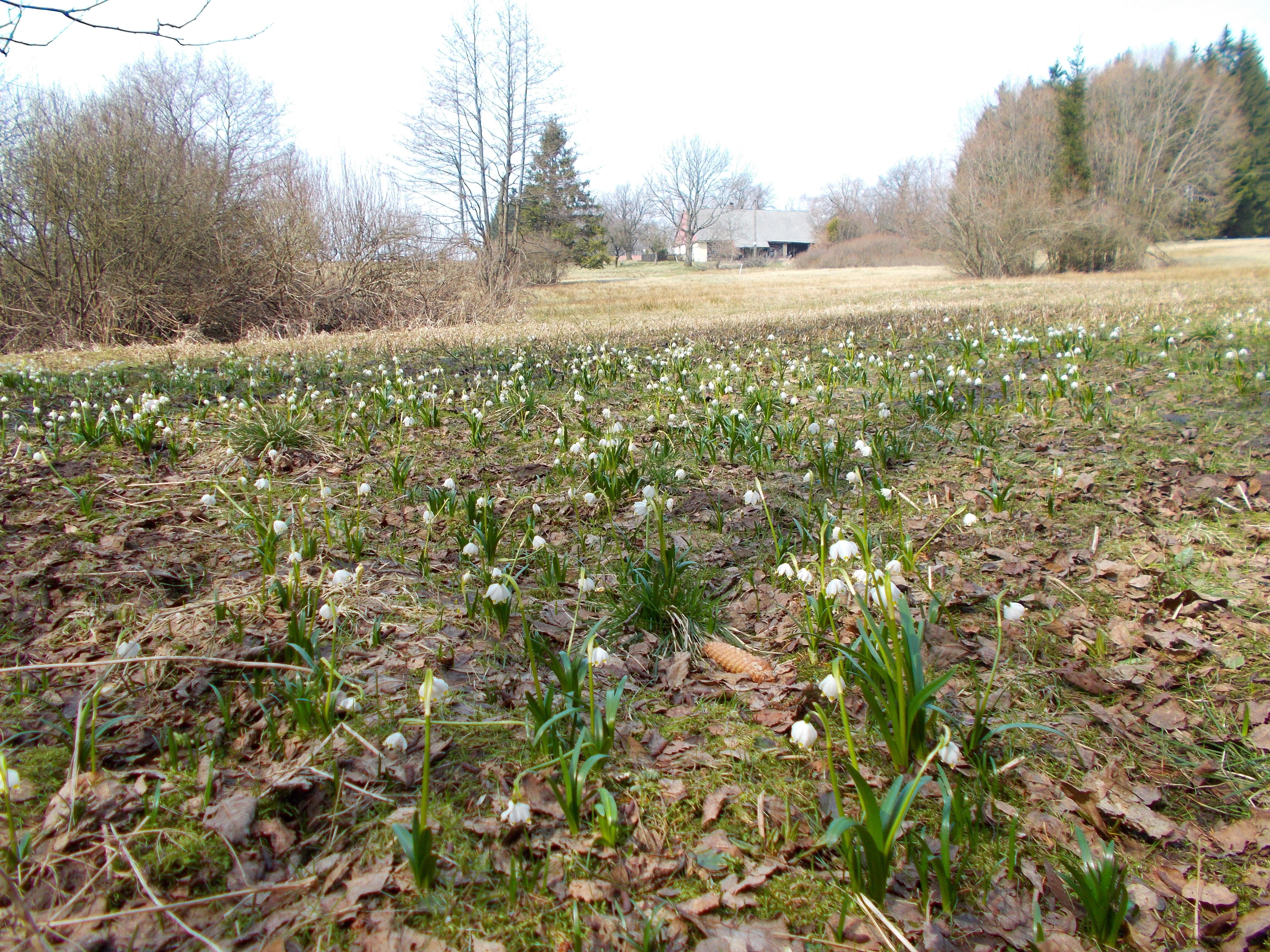 PP Rašelina